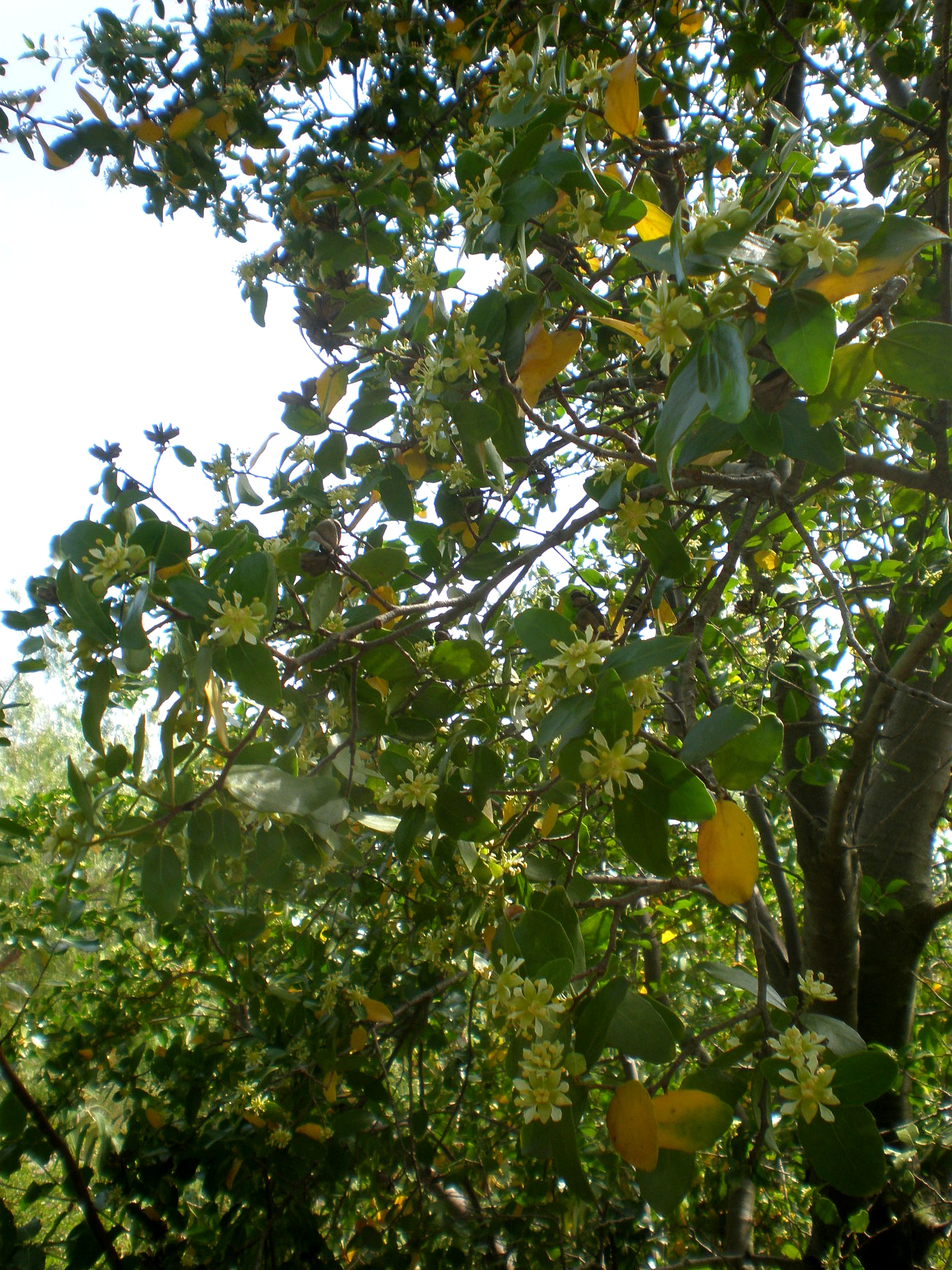 Jardín Botánico de Barcelona.